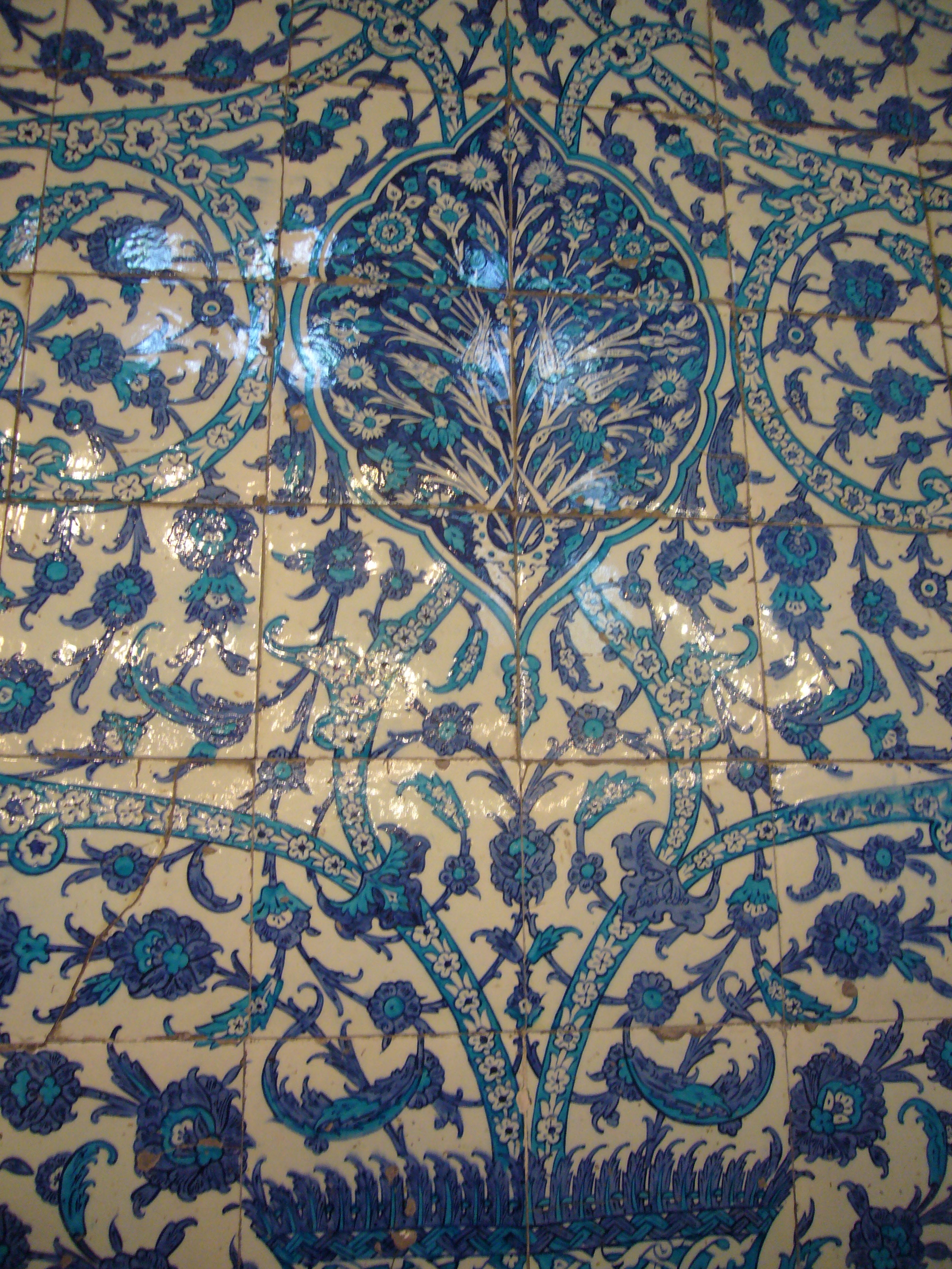 Istanbul, mausoleo di Turhan Hatice alla Yeni Cami, maioliche di Iznik